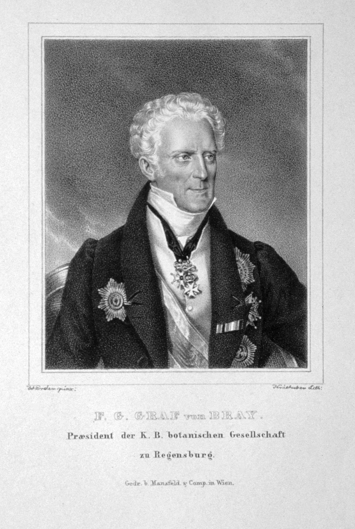 Franz Gabriel Graf Bray (1775-1832), bayerischer Diplomat, Botaniker. Lithographie von Josef Kriehuber (um 1830,), nach einem Gemälde von Johann Nepomuk Ender.